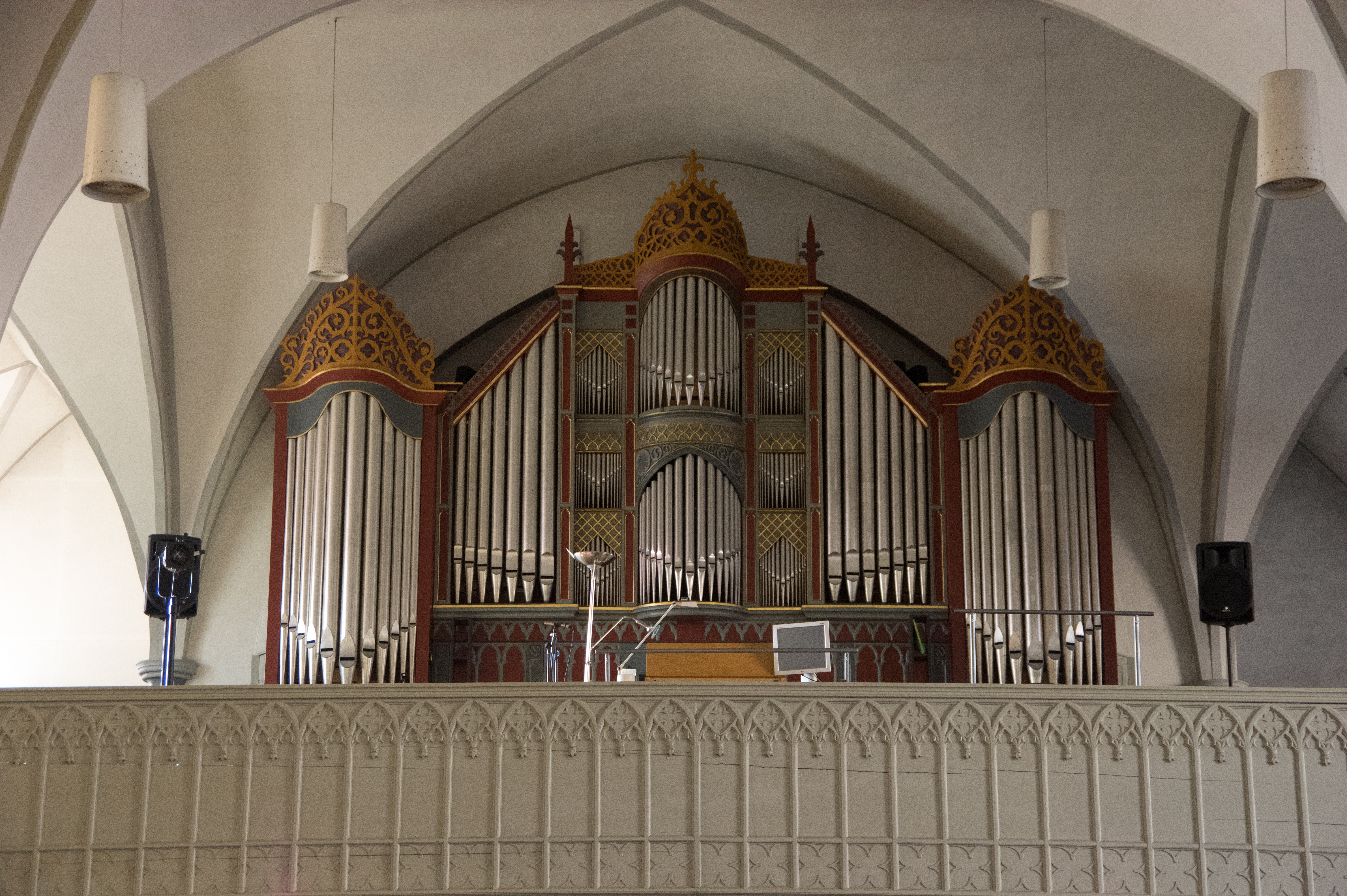 Uslar in Niedersachsen. Die Kirche steht unter Denkmalschutz. Zu sehen ist das Orgelprospekt nach Plänen von Laves.